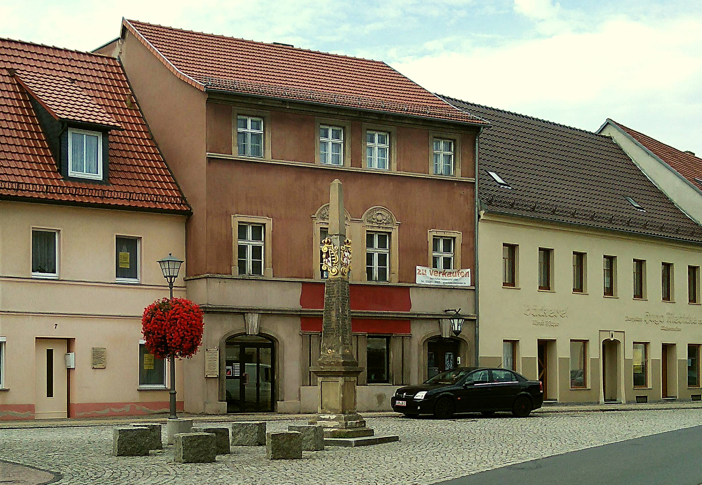 Hauptstraße Elsterwerda